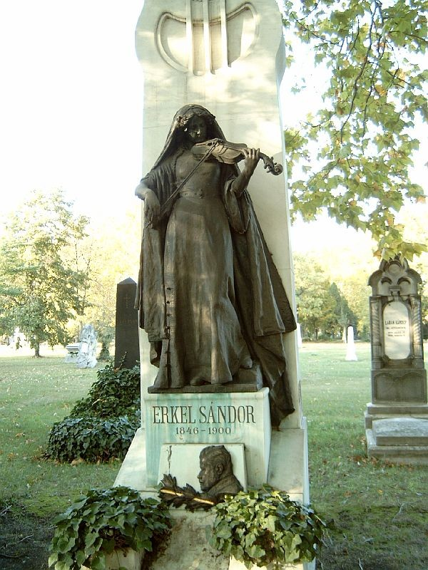 Erkel Sándor sírja Budapesten. Kerepesi temető: 28-díszsor-9 [szobrász: Kallós Ede].